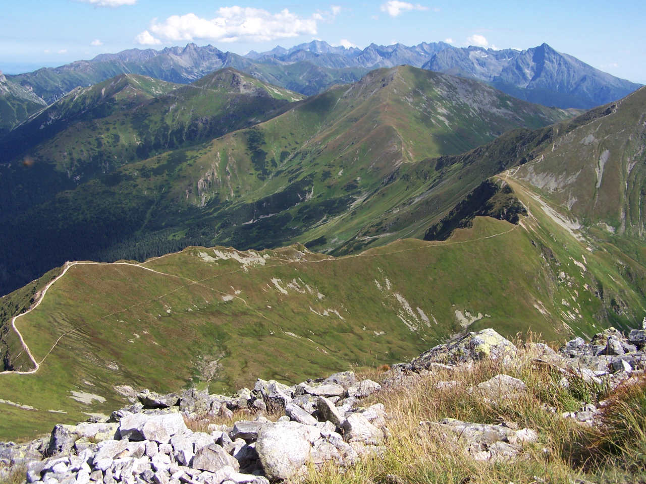 Widok ze Starorobociańskiego Wierchu na wschód; widoczna m.in. Kamienista, Smreczyński Wierch, Tomanowy Wierch Polski oraz Tatry Wysokie